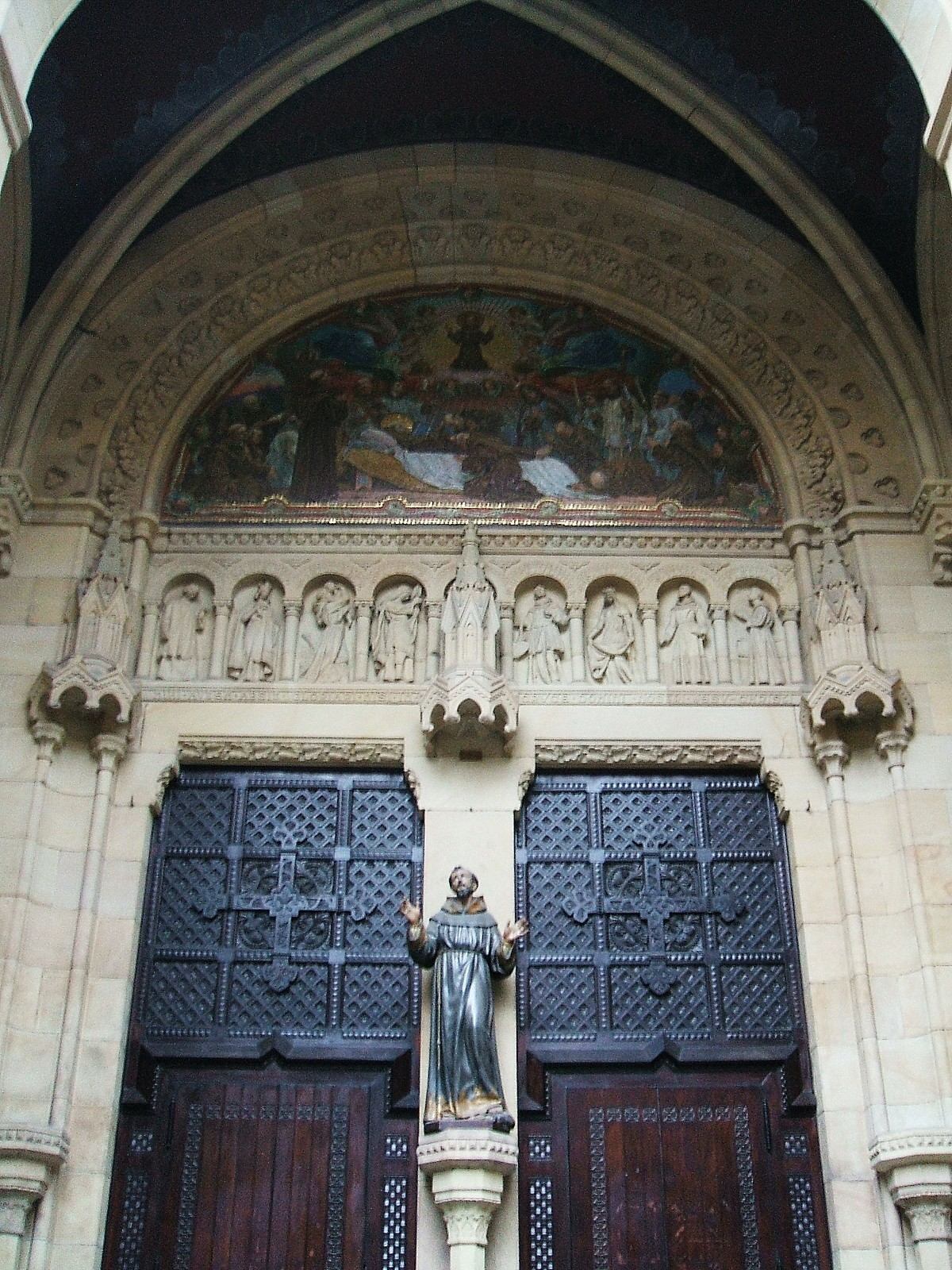 Portada interior de la iglesia de San Francisco de Asís, Bilbao